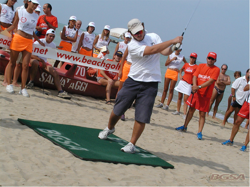 Giocatore durante l'evento Beach Golf 2002